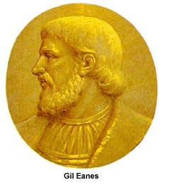 Gravura de Gil Eanes